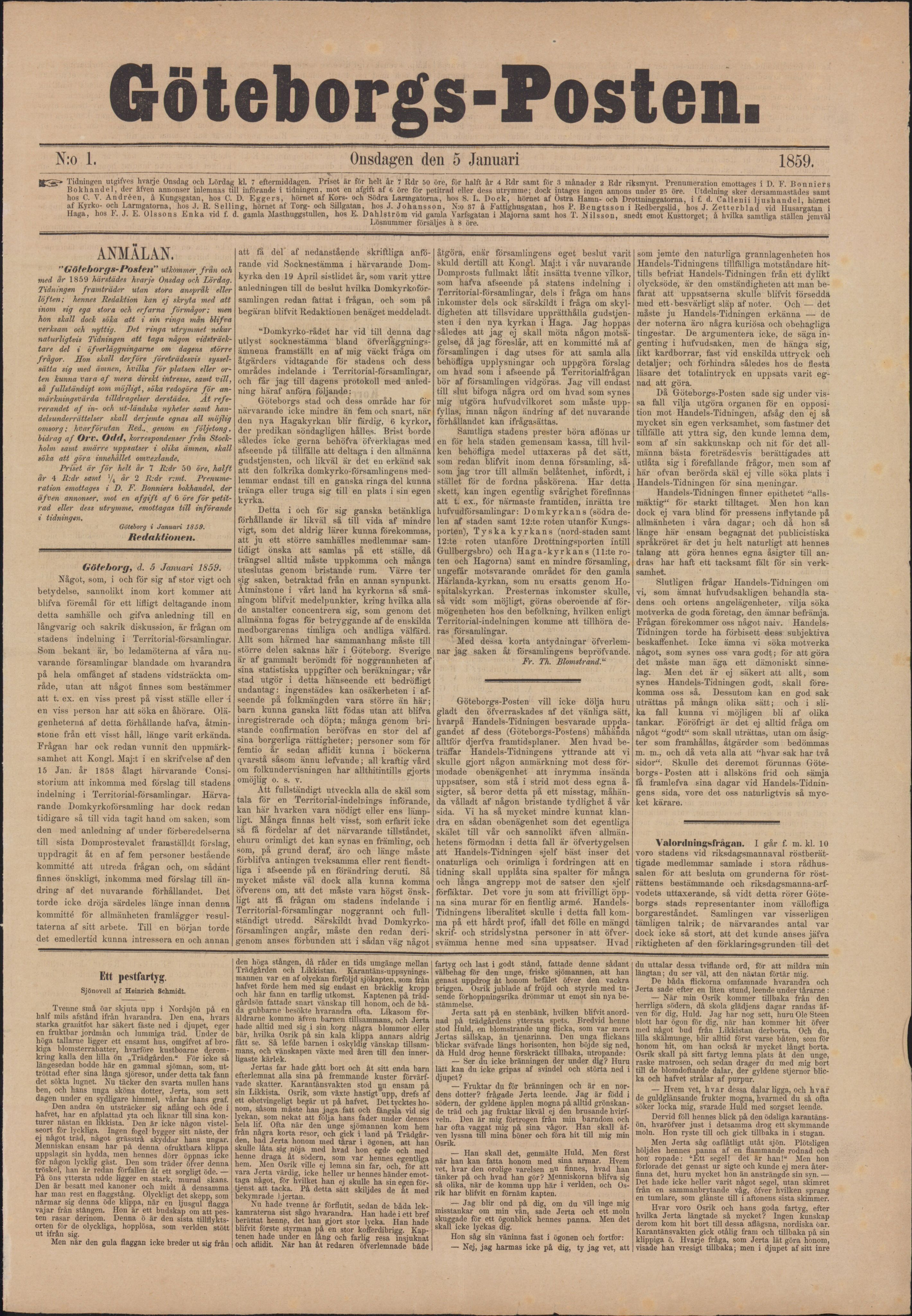 Första ordinarie numret i Göteborgs-Postens nuvarande utgivning.